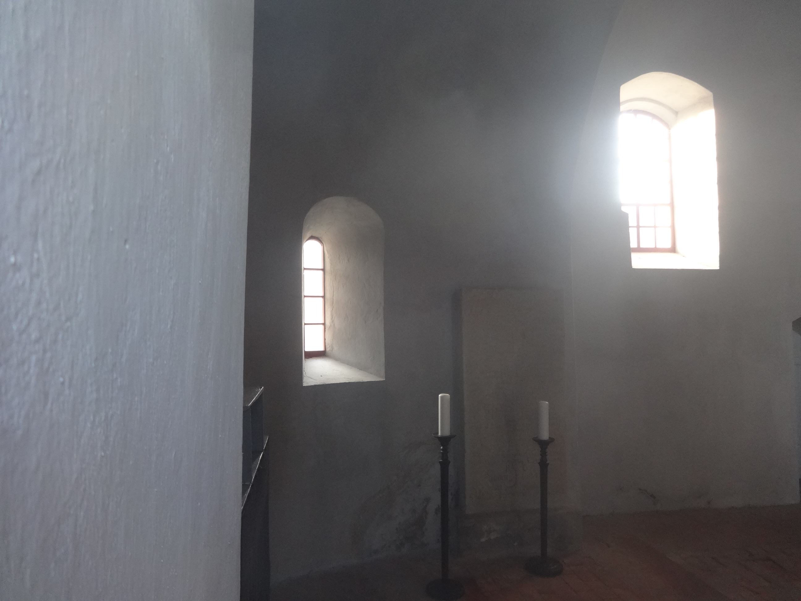 Die Feldsteinkirche in Neuheim in Jüterbog entstand vermutlich in der ersten Hälfte des 13. Jahrhunderts. Sie wird im 21. Jahrhundert als Feierhalle genutzt. Im Innern befinden sich Grabplatten der Pastoren Wolfgang Schmidt (gestorben 1663) und von Johann Friedrich Ulrich mit Ehefrau (gestorben 1737).